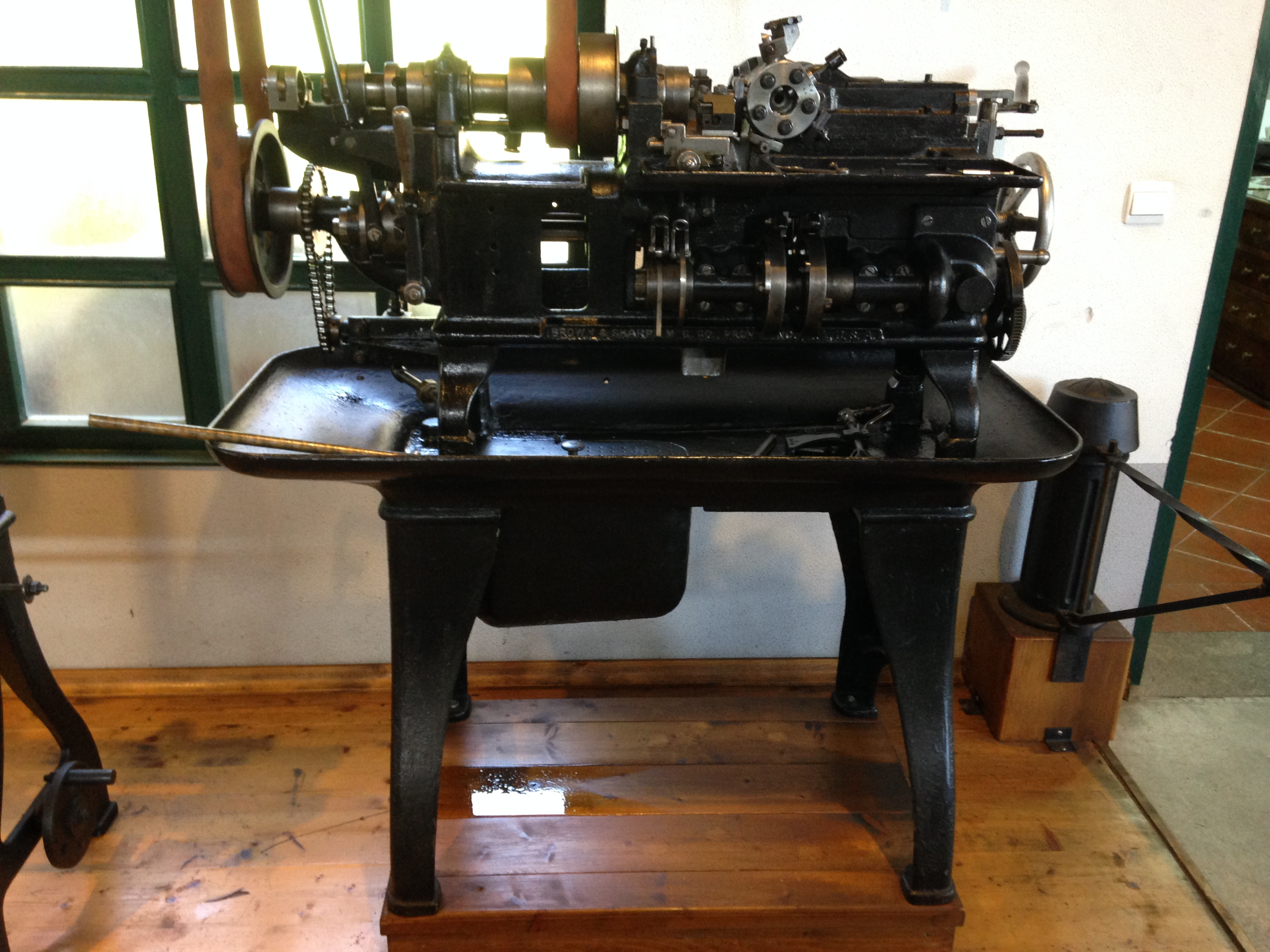 Museo de la maquina herramienta de Elgoibar (Gipuzkoa) País Vasco (España)